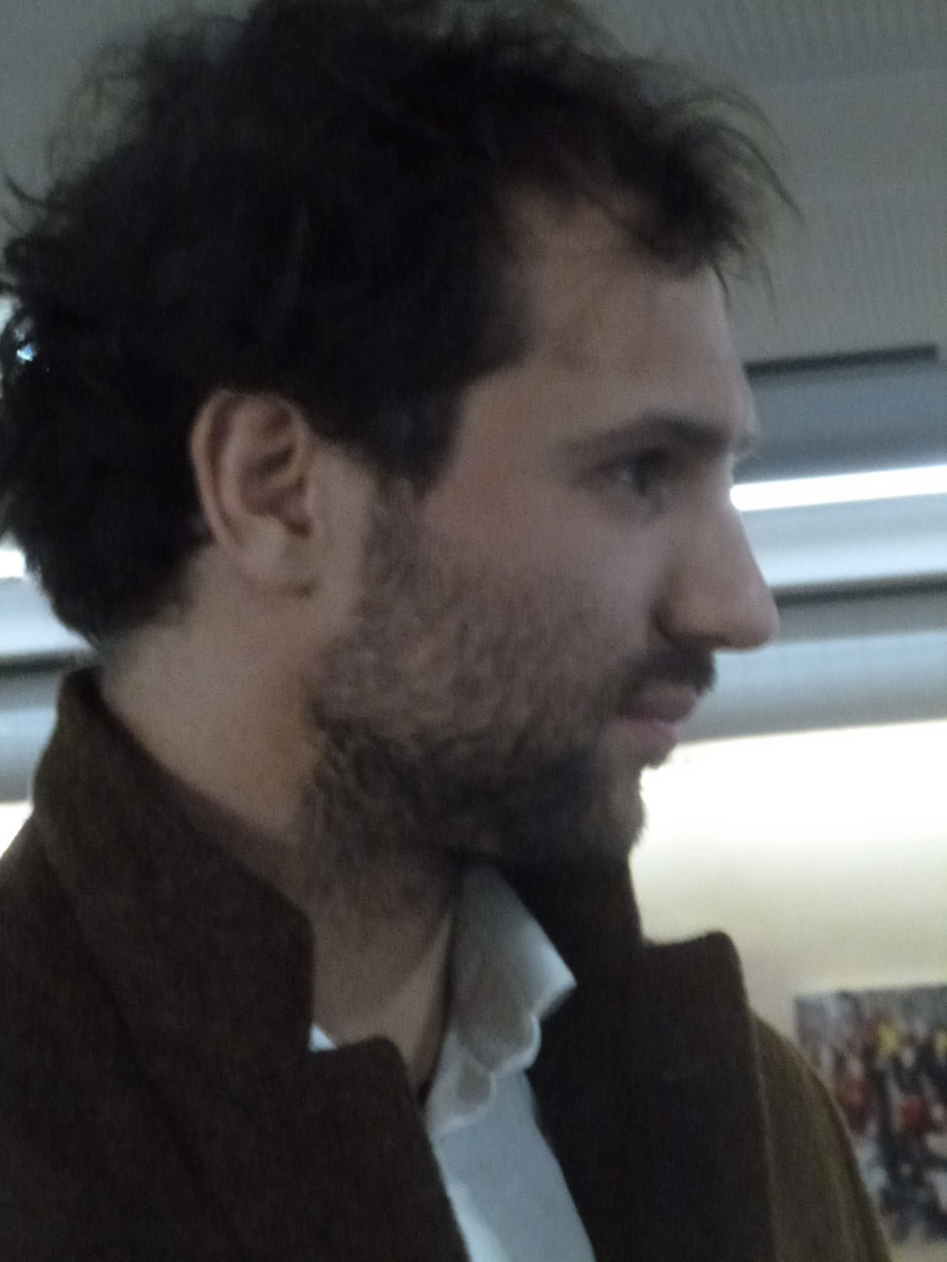 Takis Würger in Düsseldorf 2019